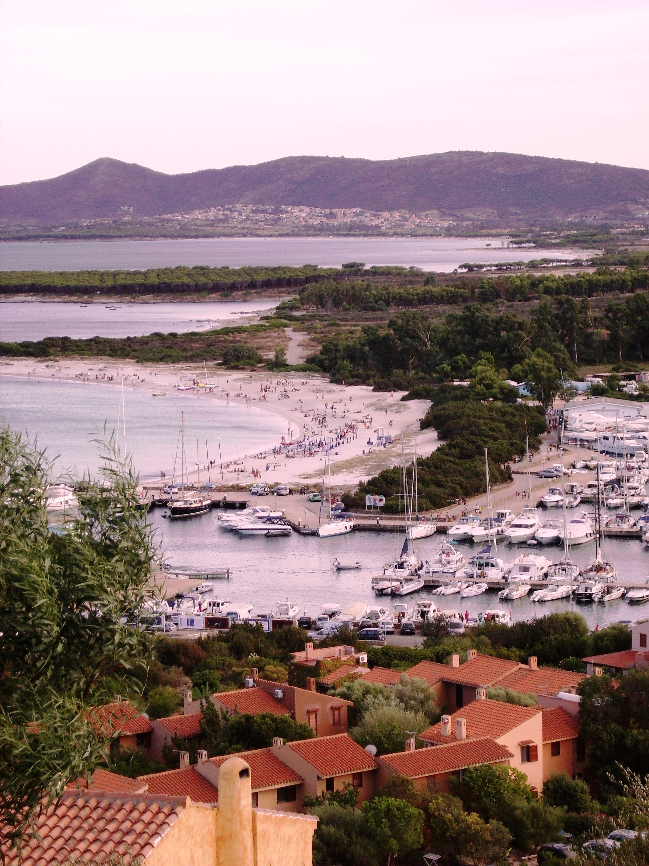 Sardegna - Budoni - Porto Ottiolu - Sullo sfondo la baia di Budoni e Tanaunella Own work by --Shardan 16:53, 14 September 2007 (UTC)